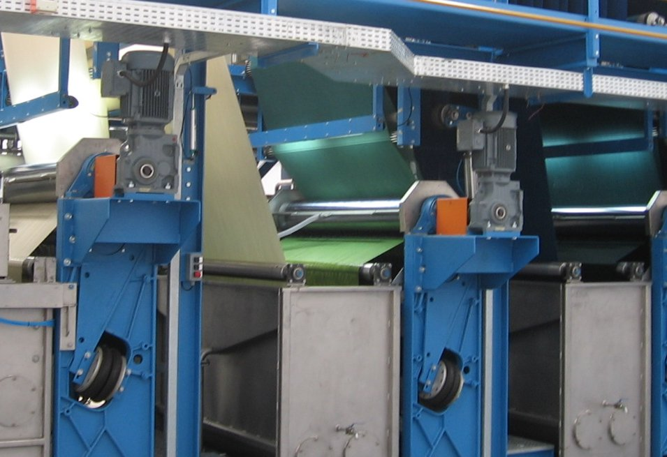 Tingimento de fios com corante índigo, Joni Dutra Neves